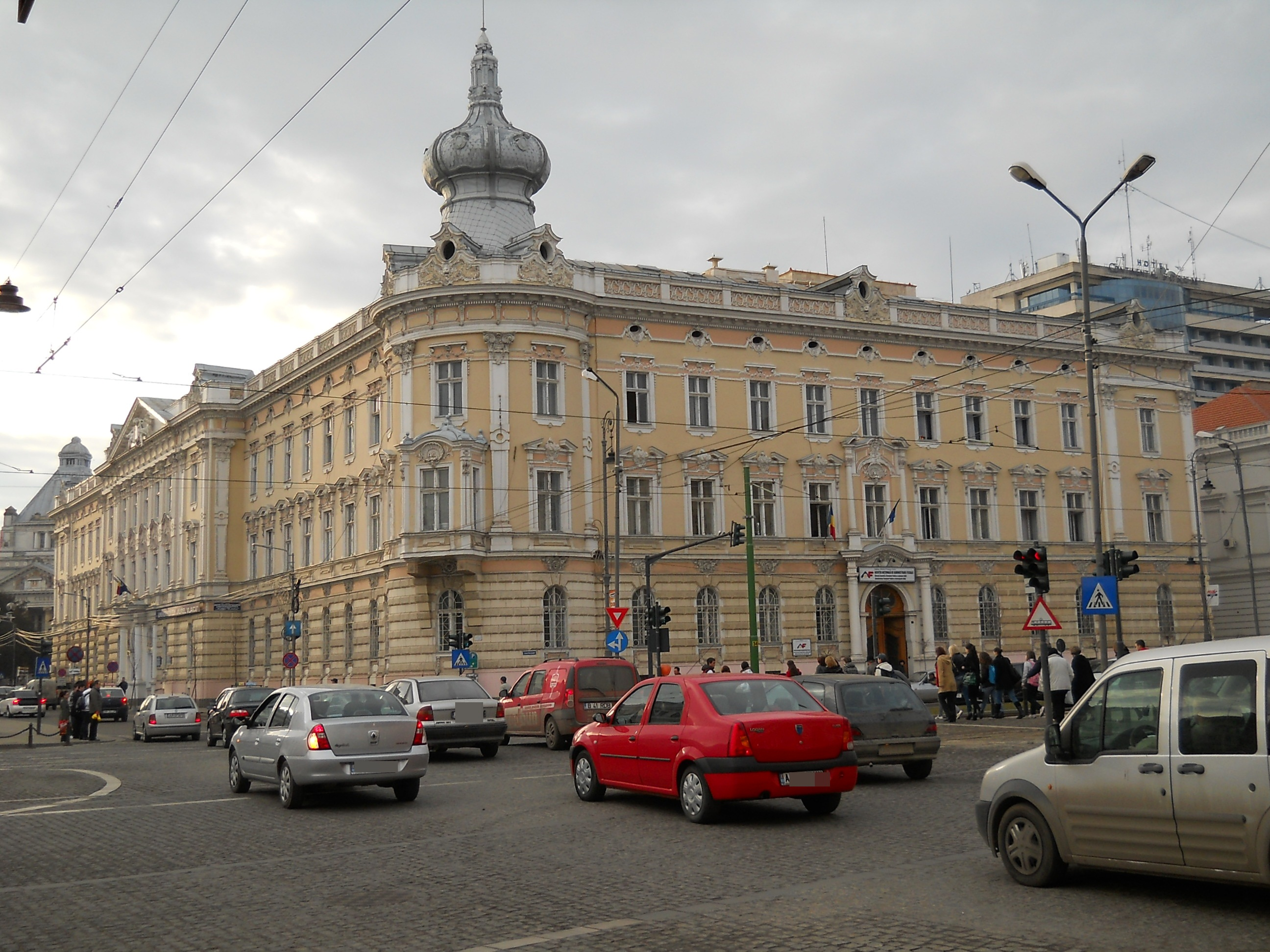 Vedere de ansamblu